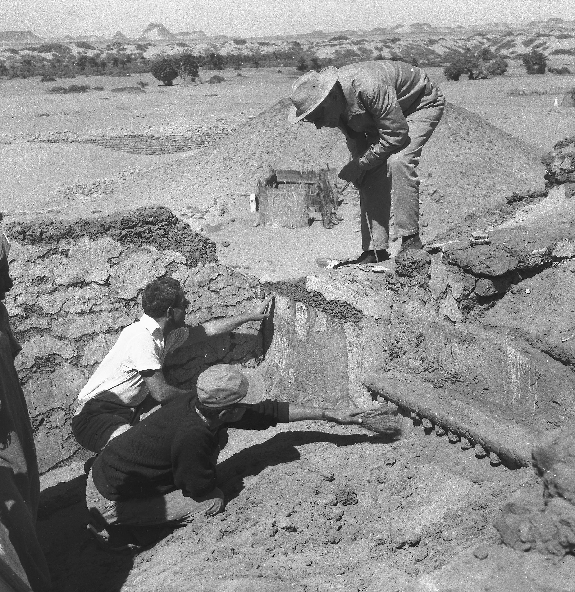 Wykopaliska w Faras. Na zdjęciu m.in. prof. Kazimierz Michałowski